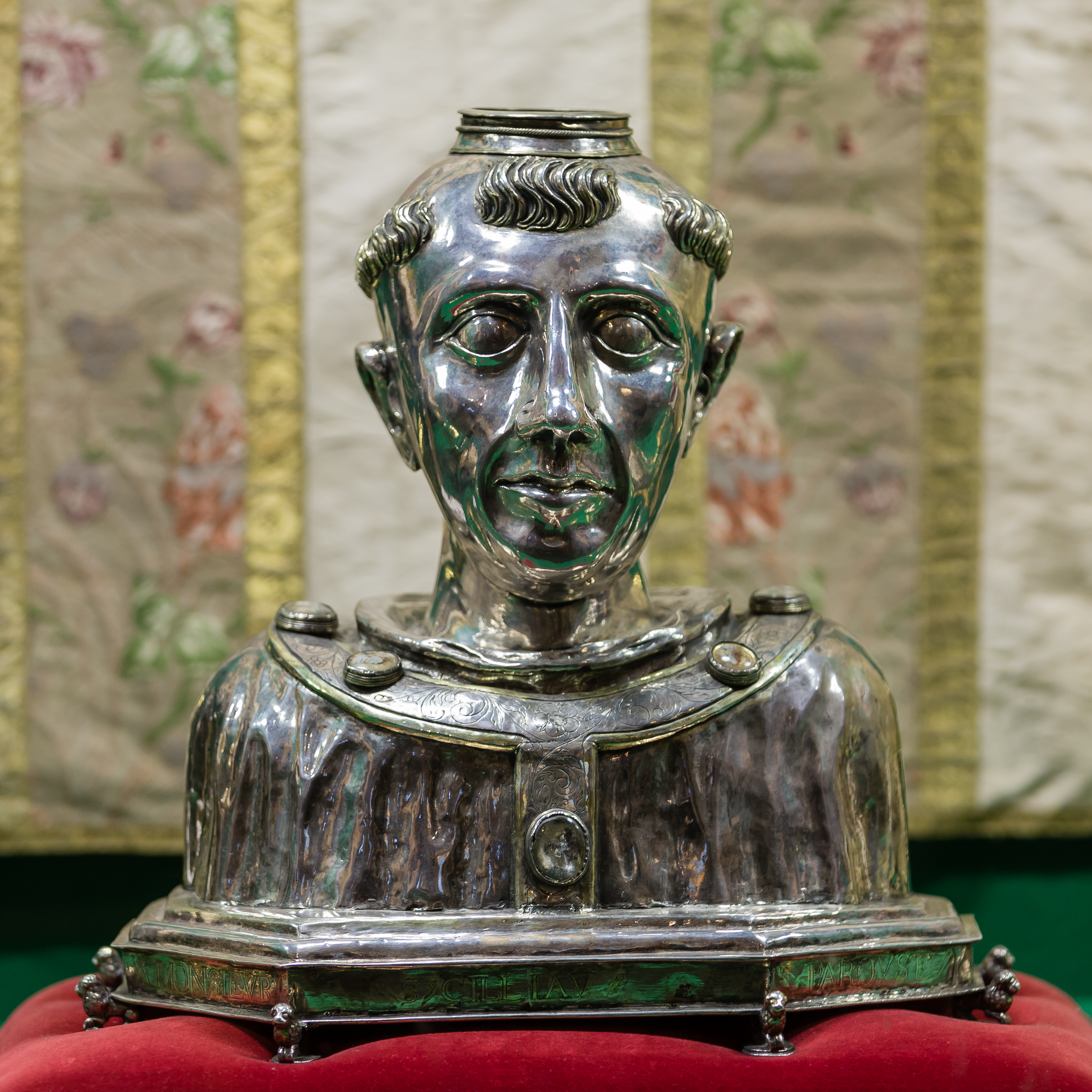 Buste reliquaire de saint Suliac dans l'église éponyme à Sizun (France).